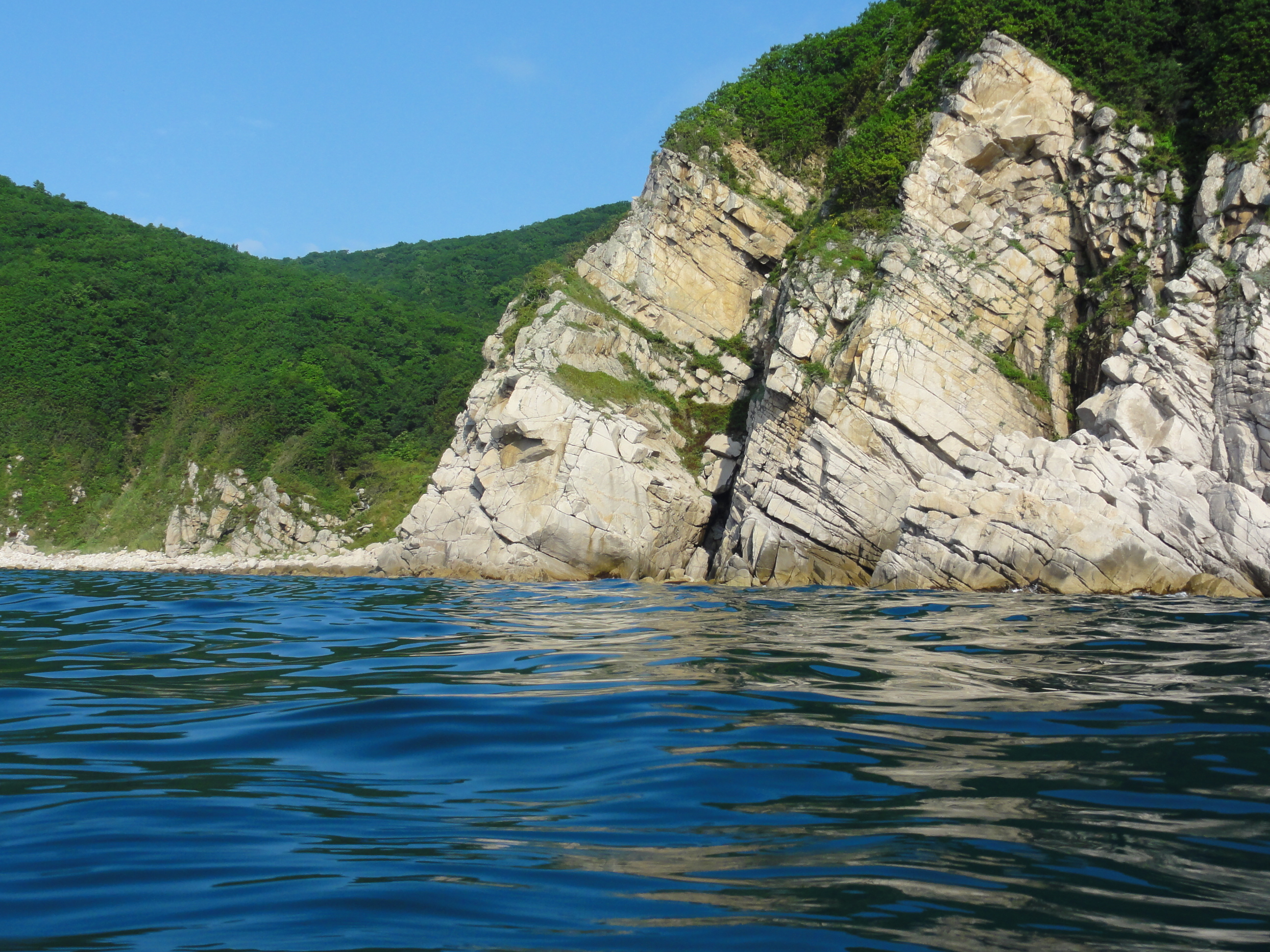 Восточное побережье Приморья, Дальнегорский район.